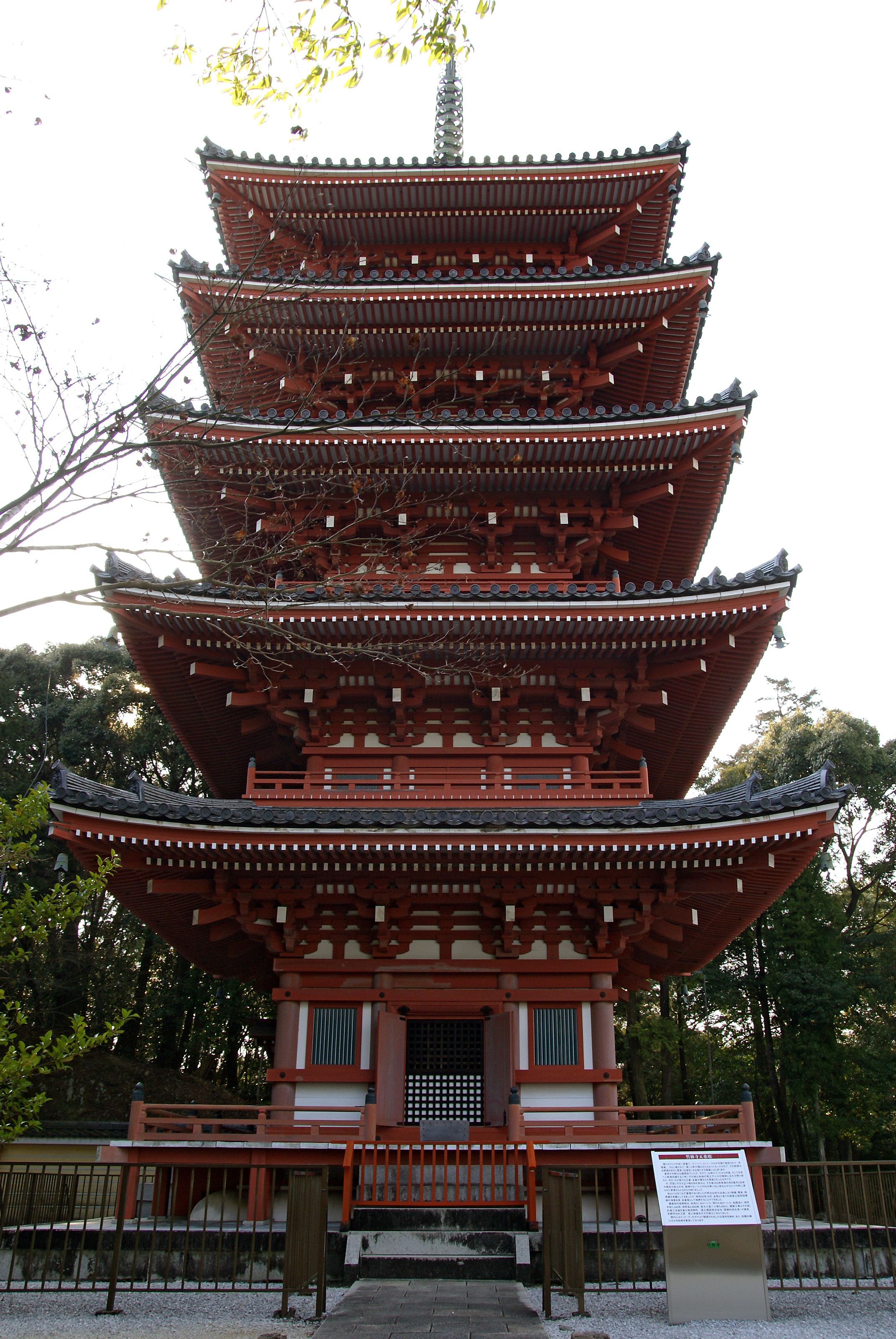 Chikurinji in Kochi, Kochi prefecture, Japan